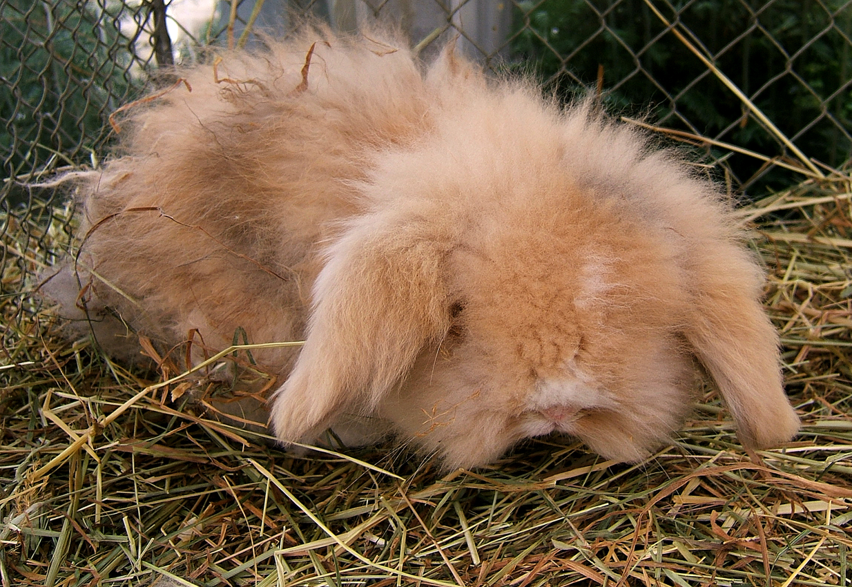 Teddywidderkaninchenbaby